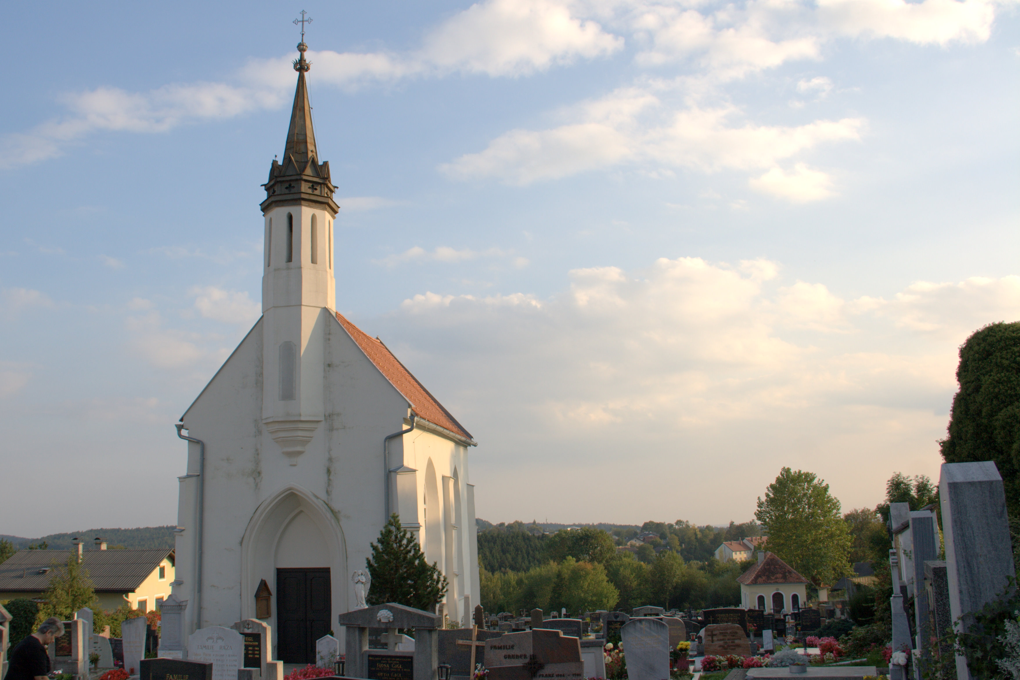 Friedhofskapelle Gekreuzigter Heiland